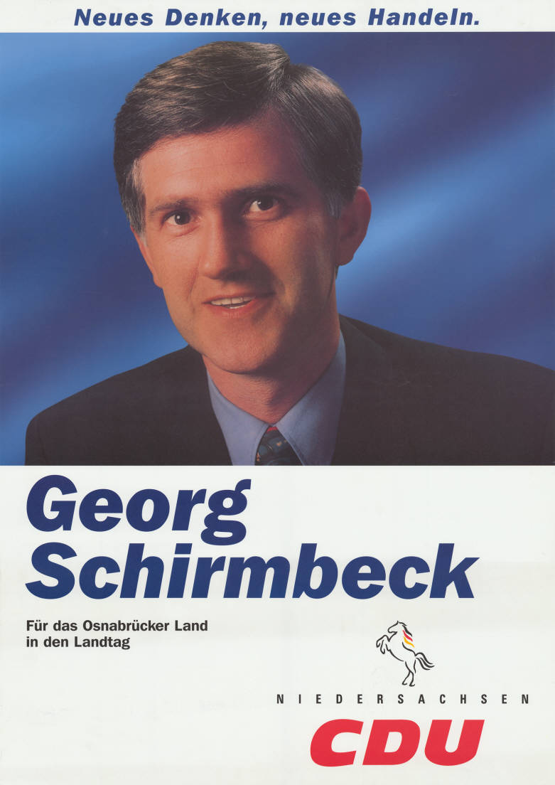 Neues Denken, neues Handeln. Georg Schirmbeck Für das Osnabrücker Land in den Landtag Niedersachsen CDU Abbildung: Porträtfoto - Niedersachsenross mit Nationalfarben Plakatart: Kandidaten-/Personenplakat mit Porträt Auftraggeber: CDU Niedersachsen Objekt-Signatur: 10-008 : 1147 Bestand: Landtagswahlplakate Niedersachsen ( 10-008) GliederungBestand10-18: Landtagswahlplakate Niedersachsen (10-008) » CDU Lizenz: KAS/ACDP 10-008 : 1147 CC-BY-SA 3.0 DE